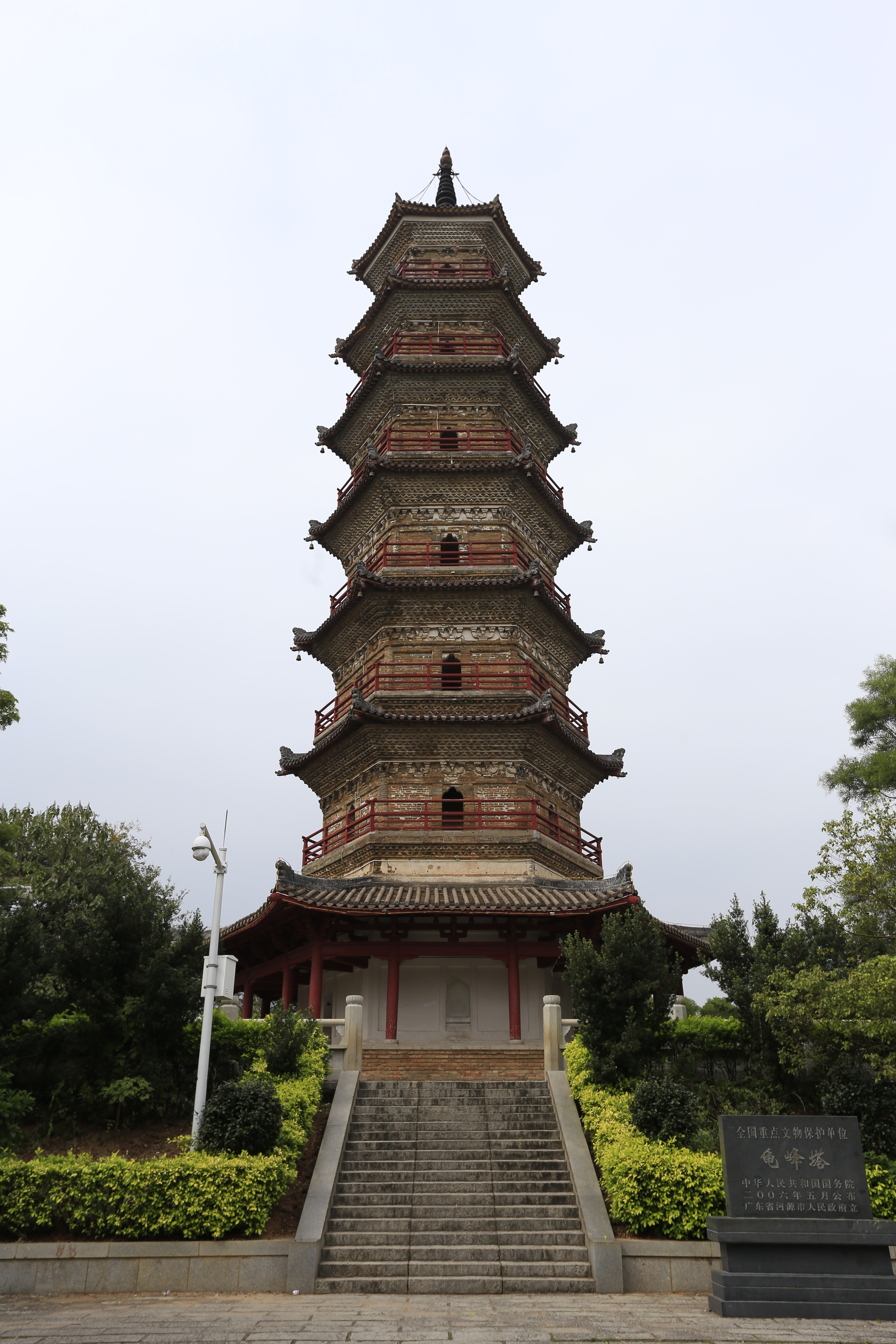 河源龟峰塔—— 东面